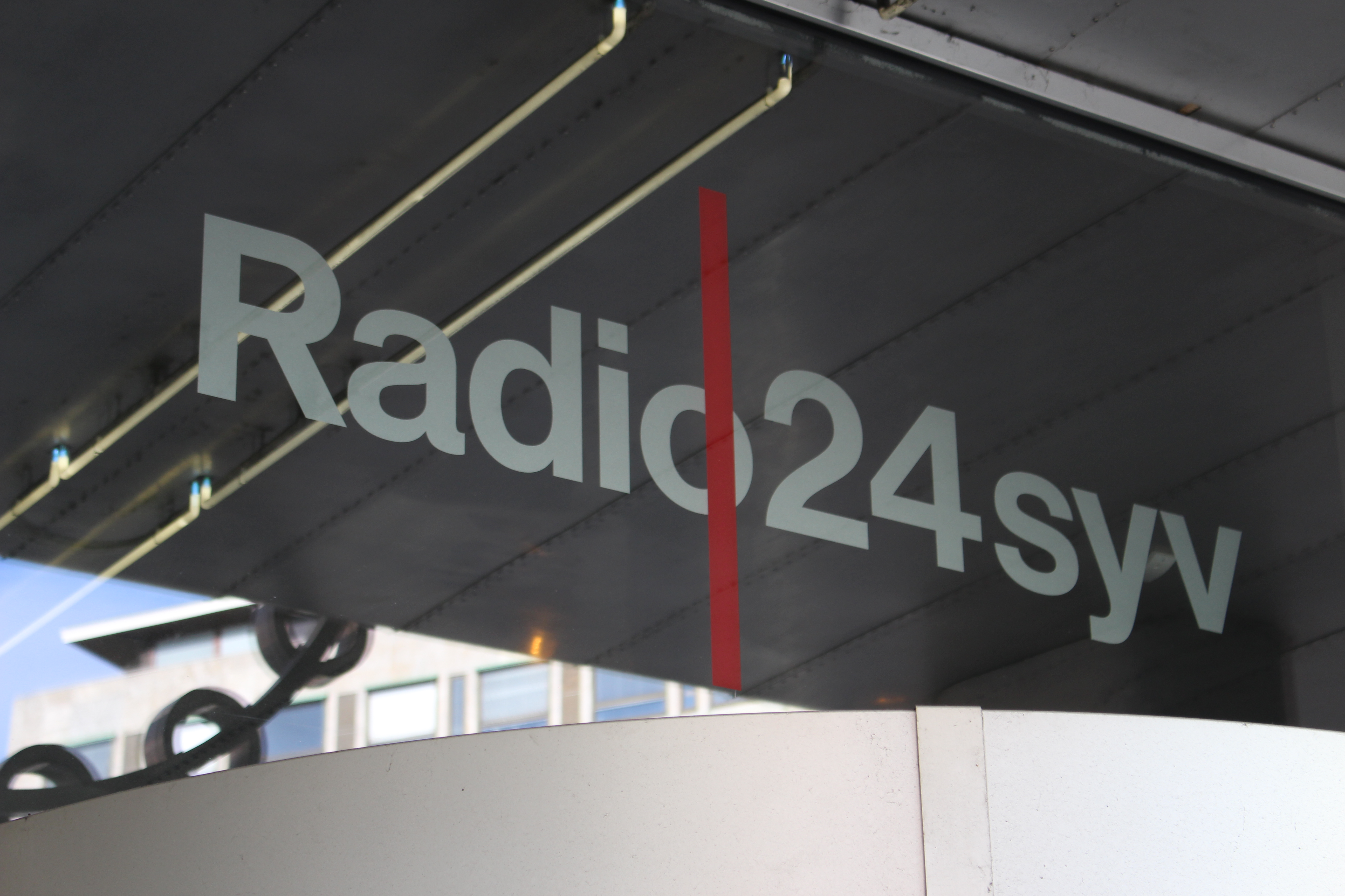 Radio24syv's indgang, Vester Farimagsgade 41.